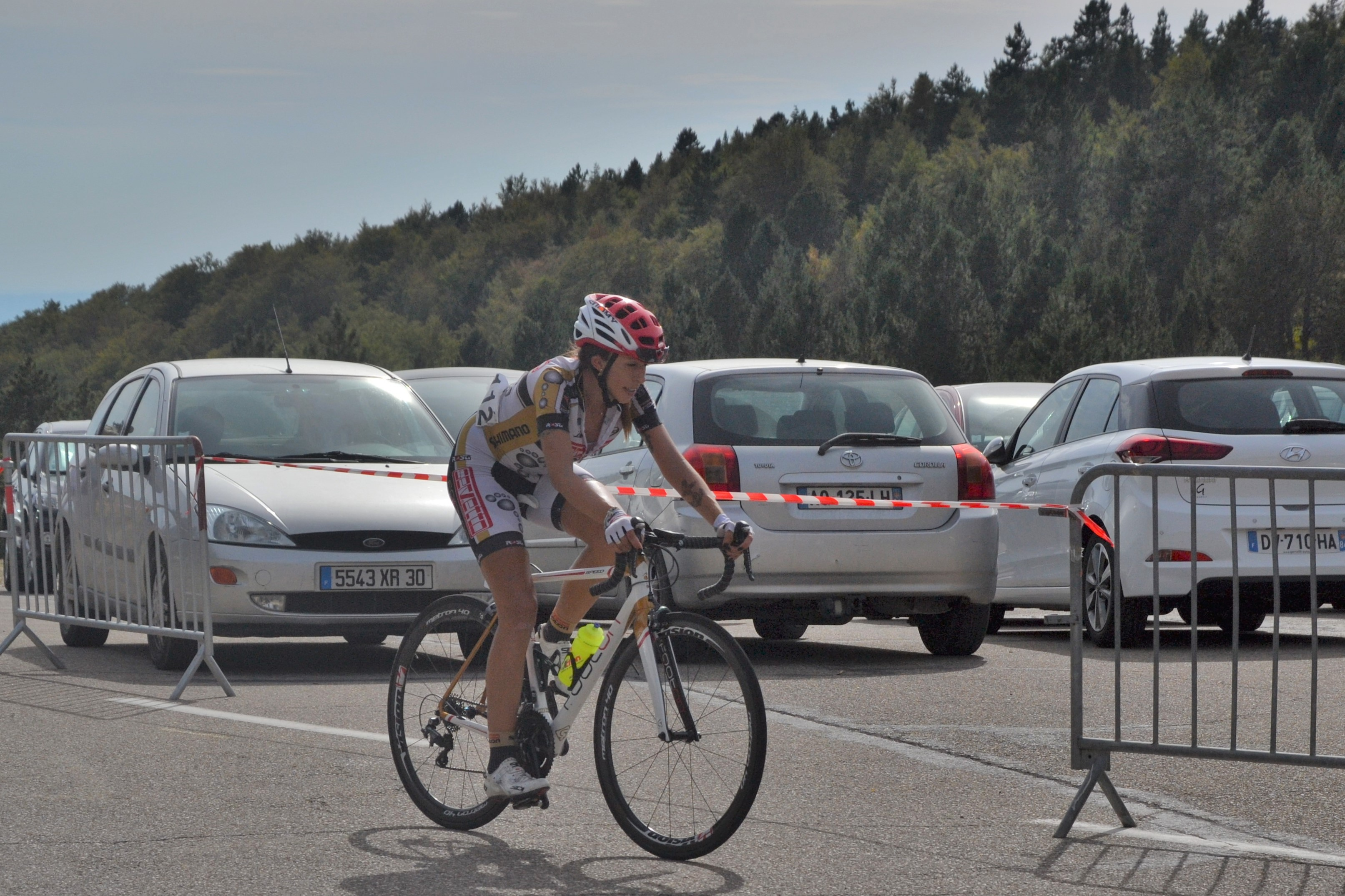 Tour féminin international de l'Ardèche 2016, 3ème étape, lors de l'ascension du Mont Ventoux.